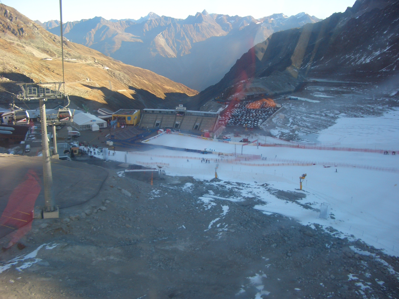 The Gletscherstadion